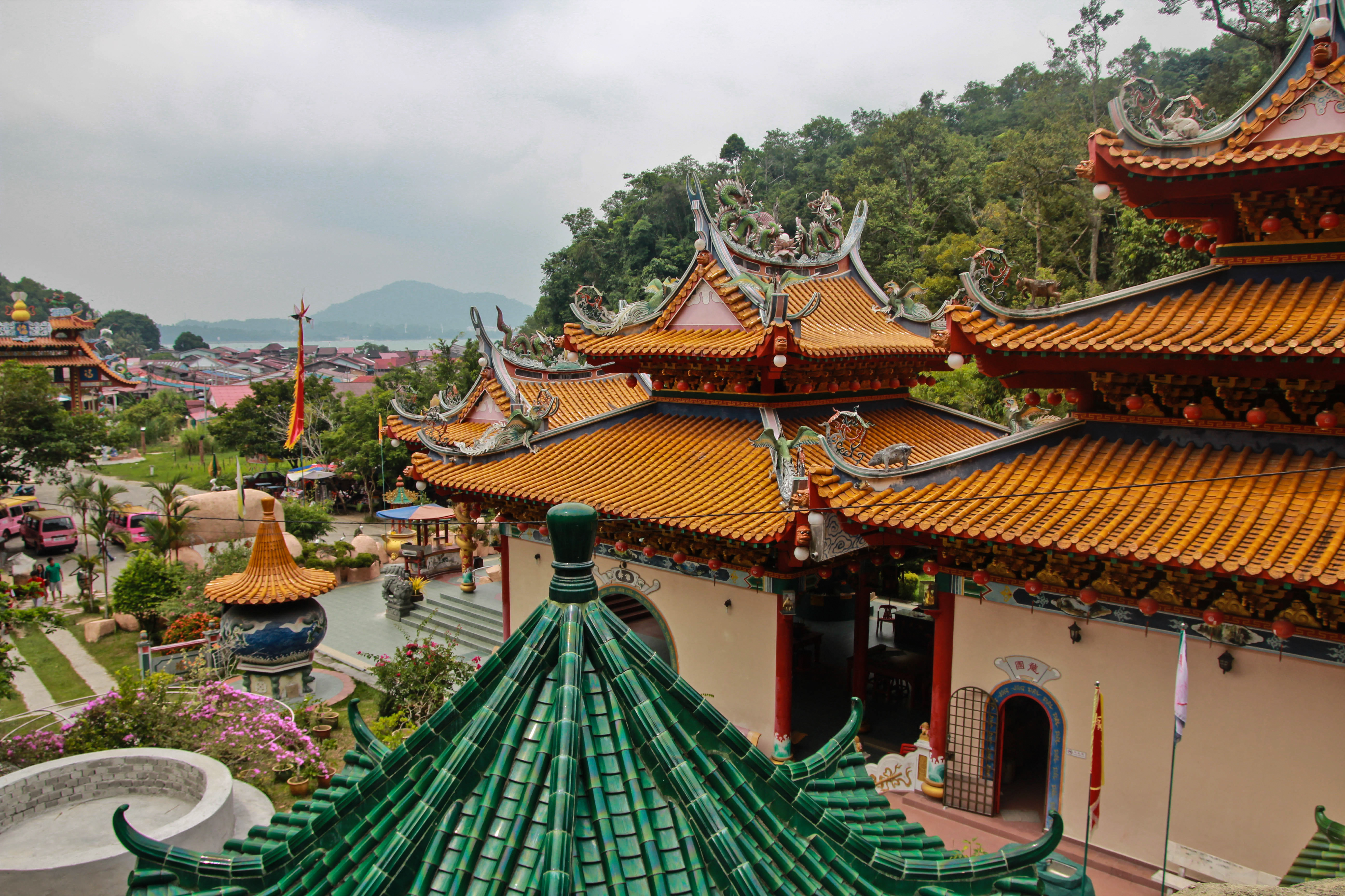 Foo Lin Kong Tempel - Pulau Pangkor, Malaysia